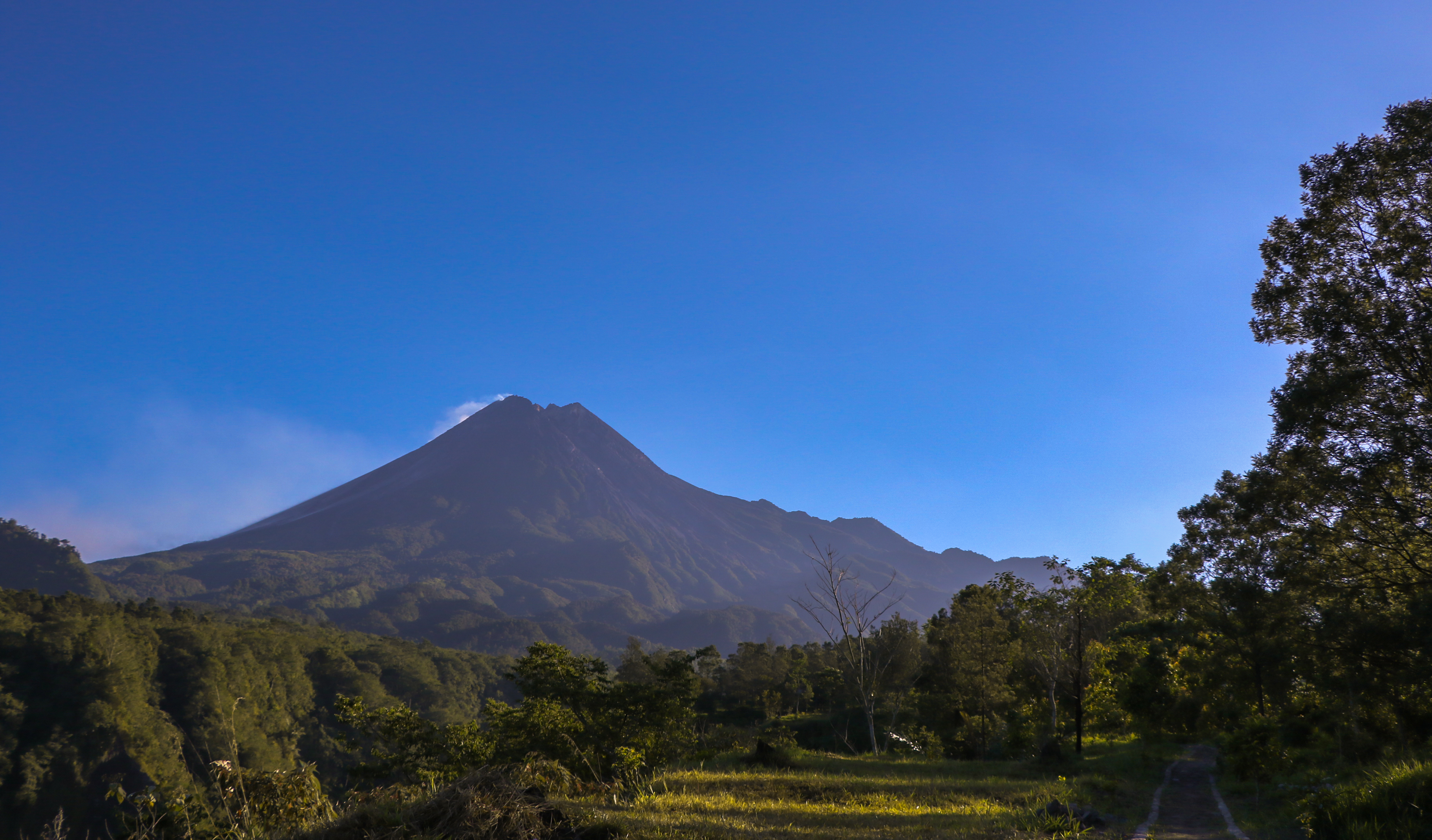 gunung merapi di pagihari